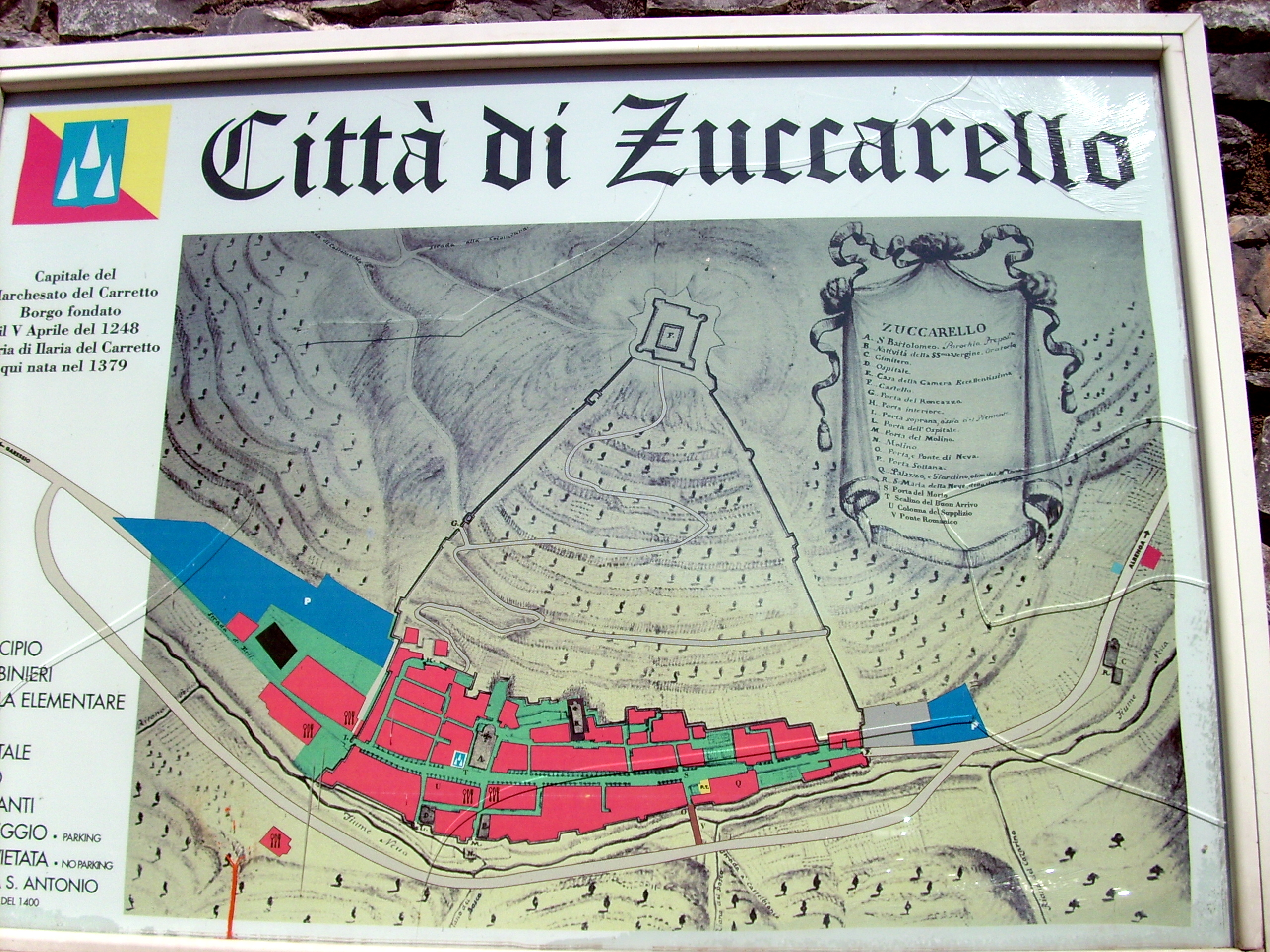 Zuccarello, Liguria, Italia